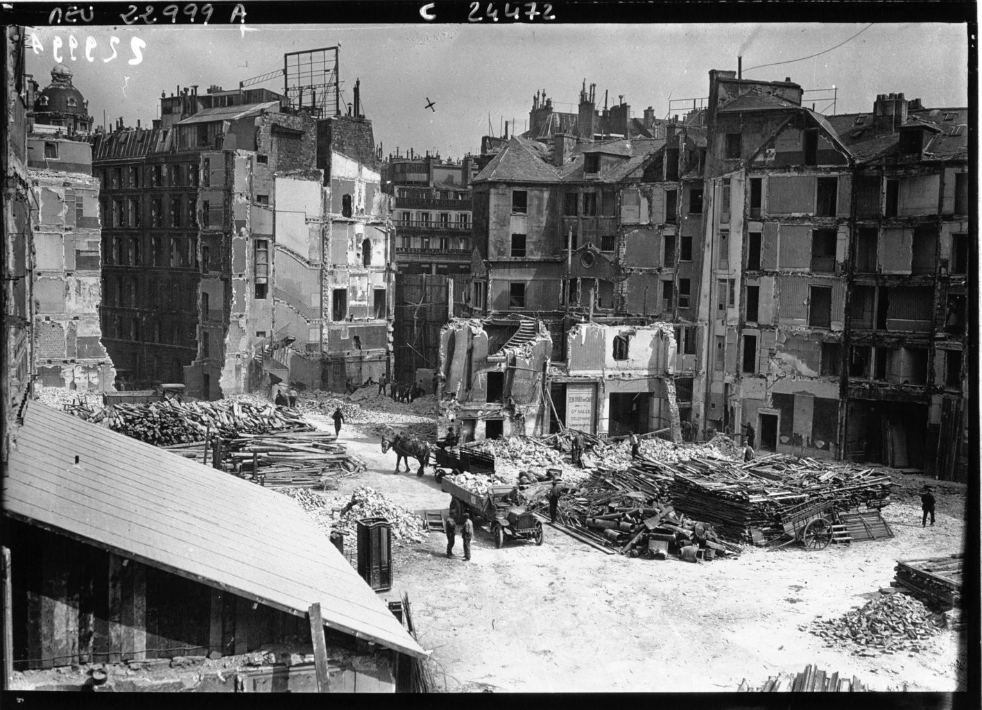 L'achèvement du percement du boulevard Haussmann dans le 9e arrondissement de Paris.